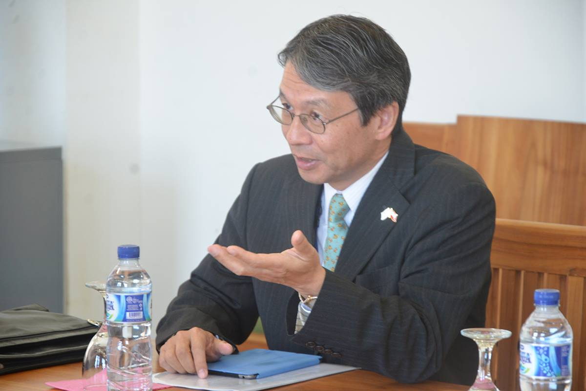 Eiji Yamamoto, Botschafter Japans in Osttimor